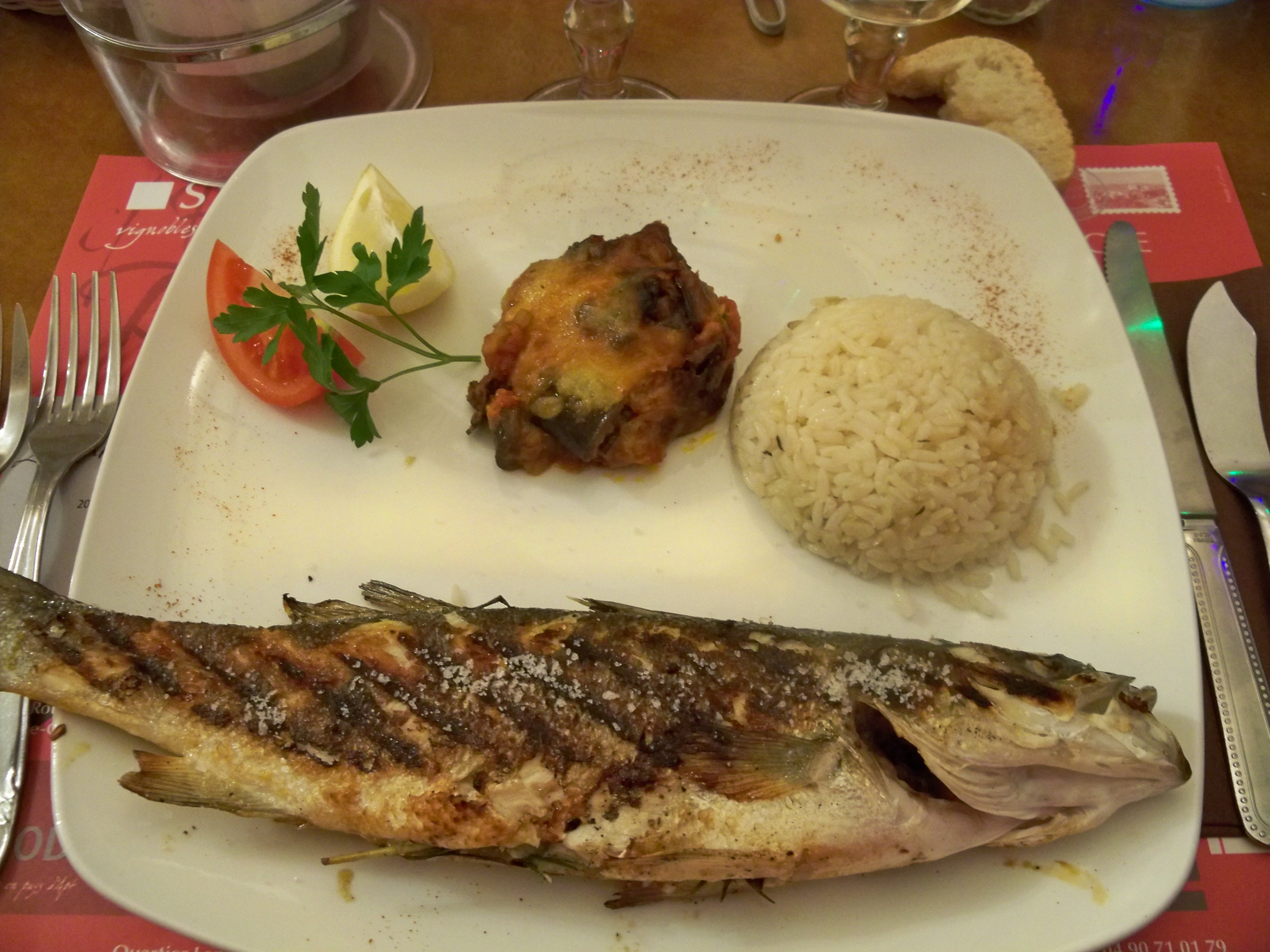 poison Loup Grillé